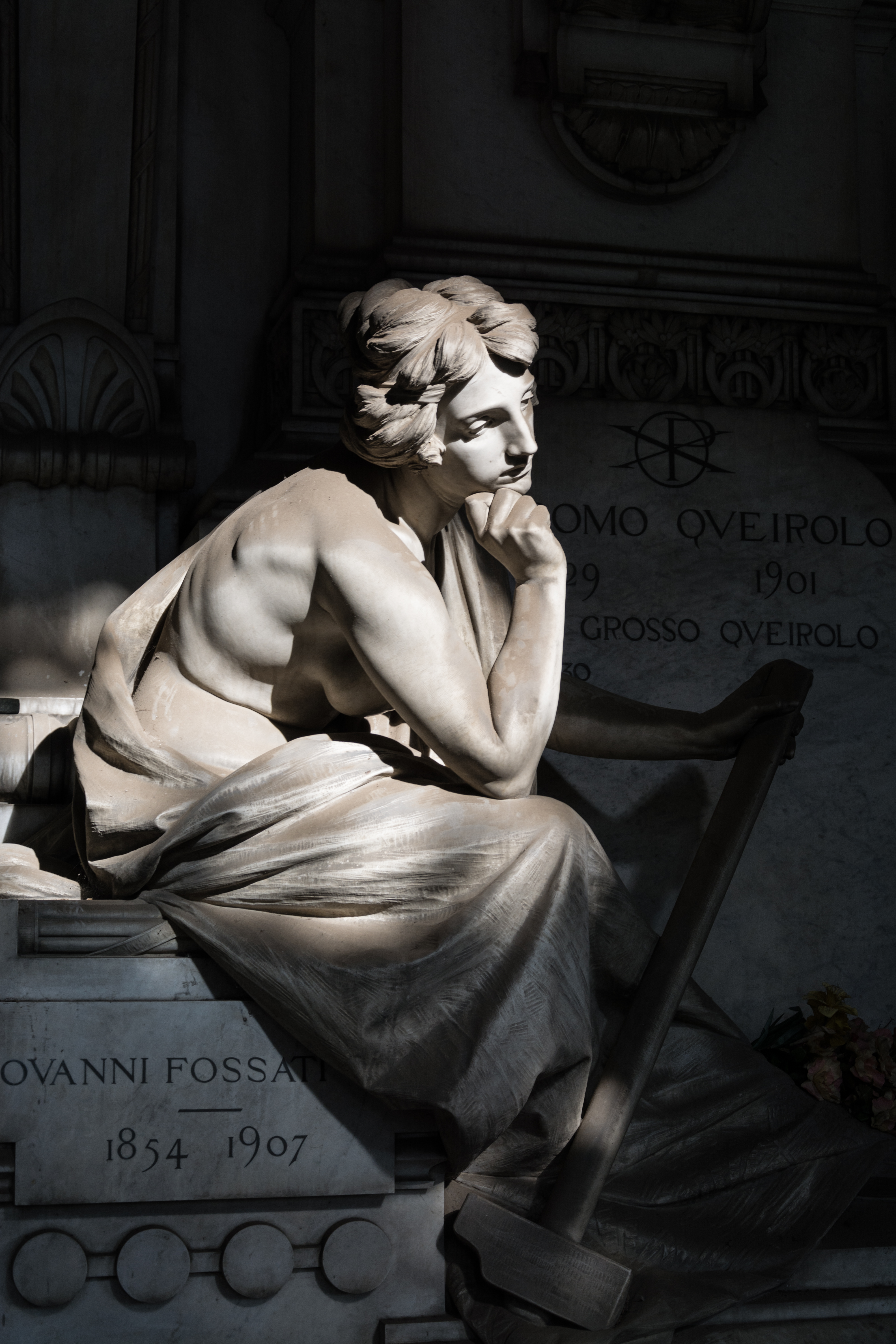 Cimitero di Staglieno This is a photo of a monument which is part of cultural heritage of Italy.